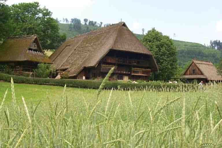 Der Vogtsbauernhof, des Zentrum des gleichnamigen Freilichtmuseums